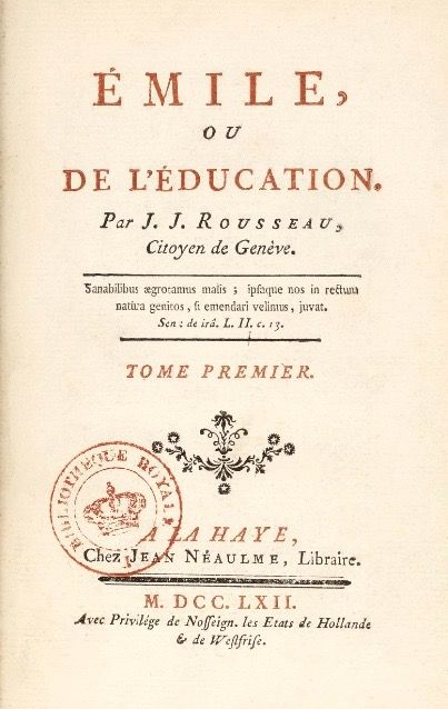 L'Émile, ou de l'éducation, par Jean-Jacques Rousseau, 1762, édition Jean Néaulme, La Haye, 1762.